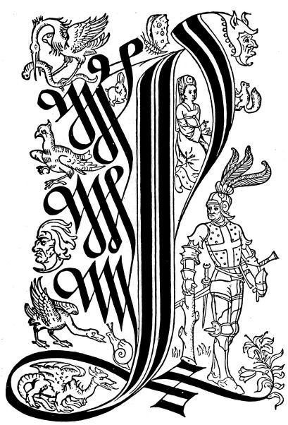 eigen scan Pierre le Rouge Aanvangsletter in 'La mer des hystoires' houtsnede 1488